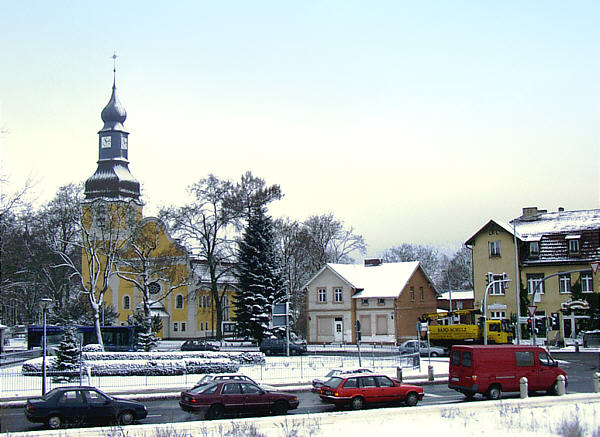 Stadtzentrum mit Kirche Hohen Neuendorf, Deutschland.